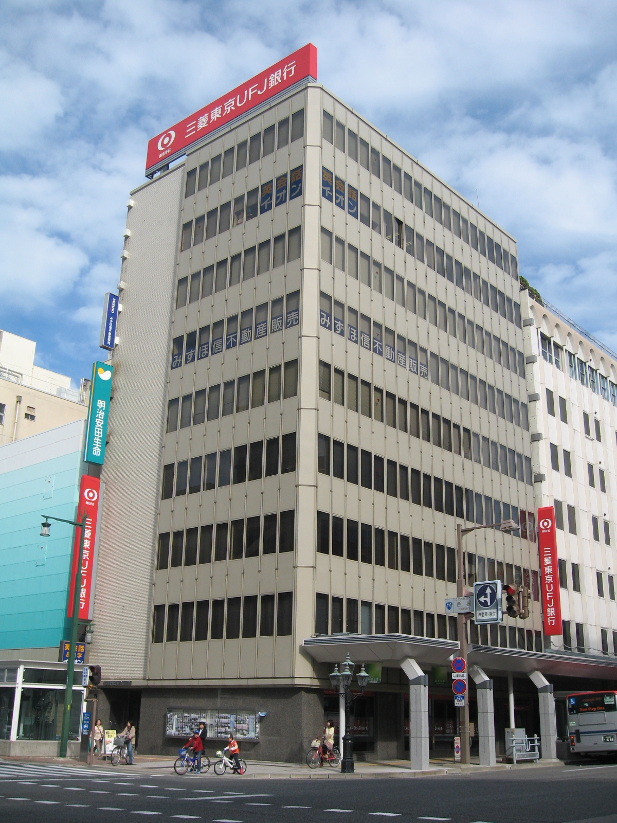 東京三菱UFJ銀行新潟支店の画像。